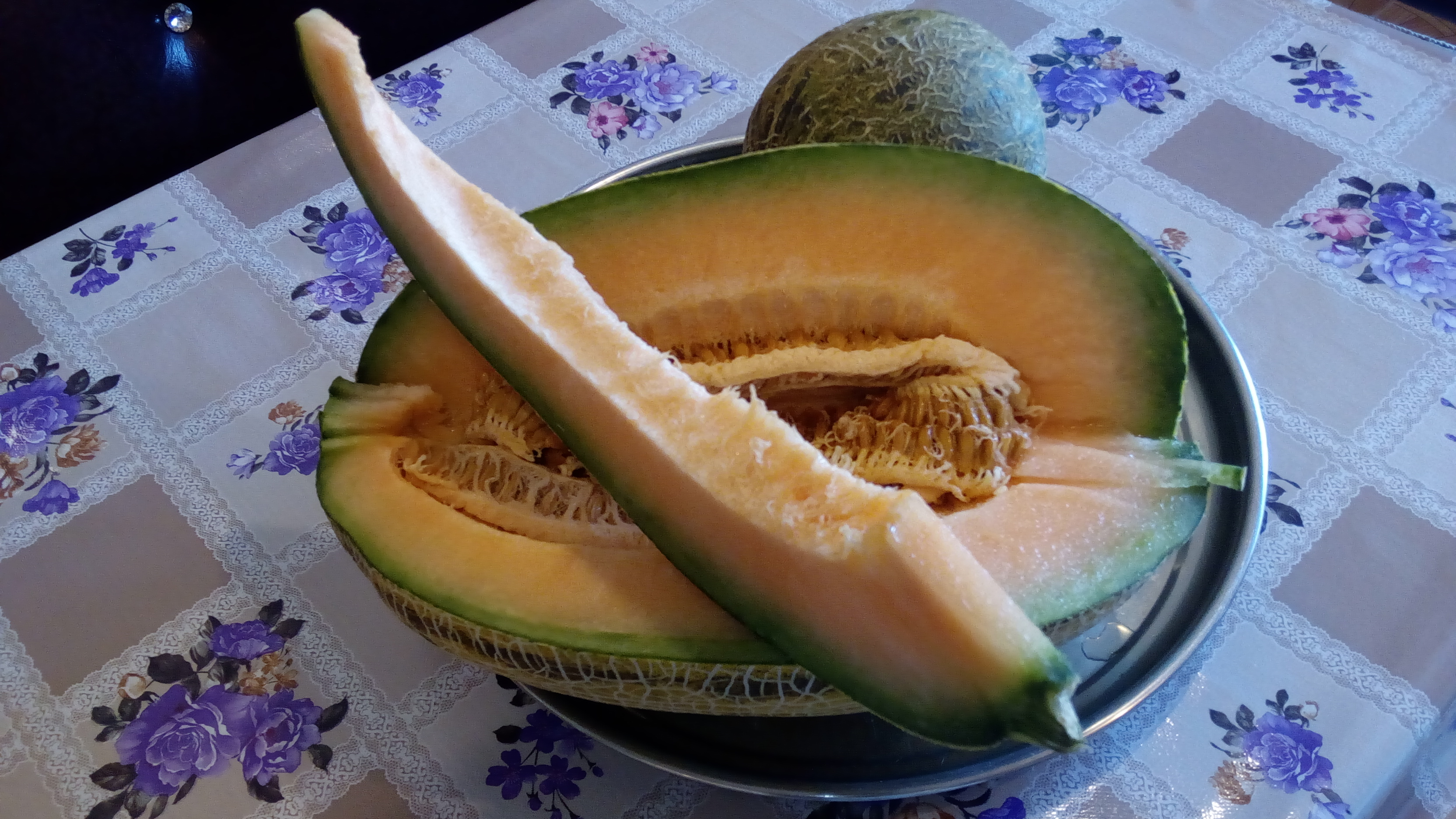 Cərco yemişi